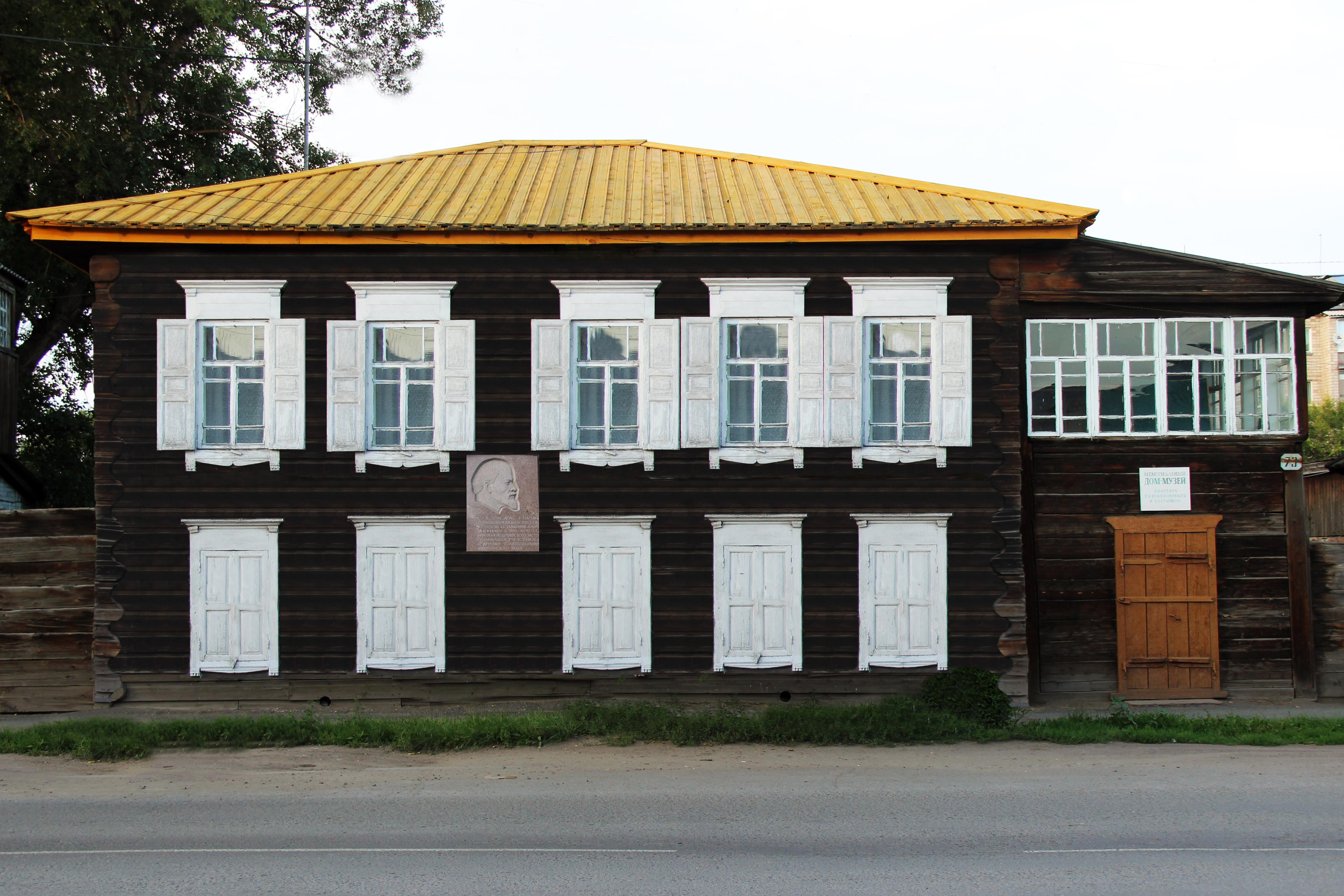 Музей "Квартира Г.М. Крыжижановского и В.В. Старкова" - закрыт c 1 по 22 июля 2014 г. для одиночных посетителей в связи с ремонтом.